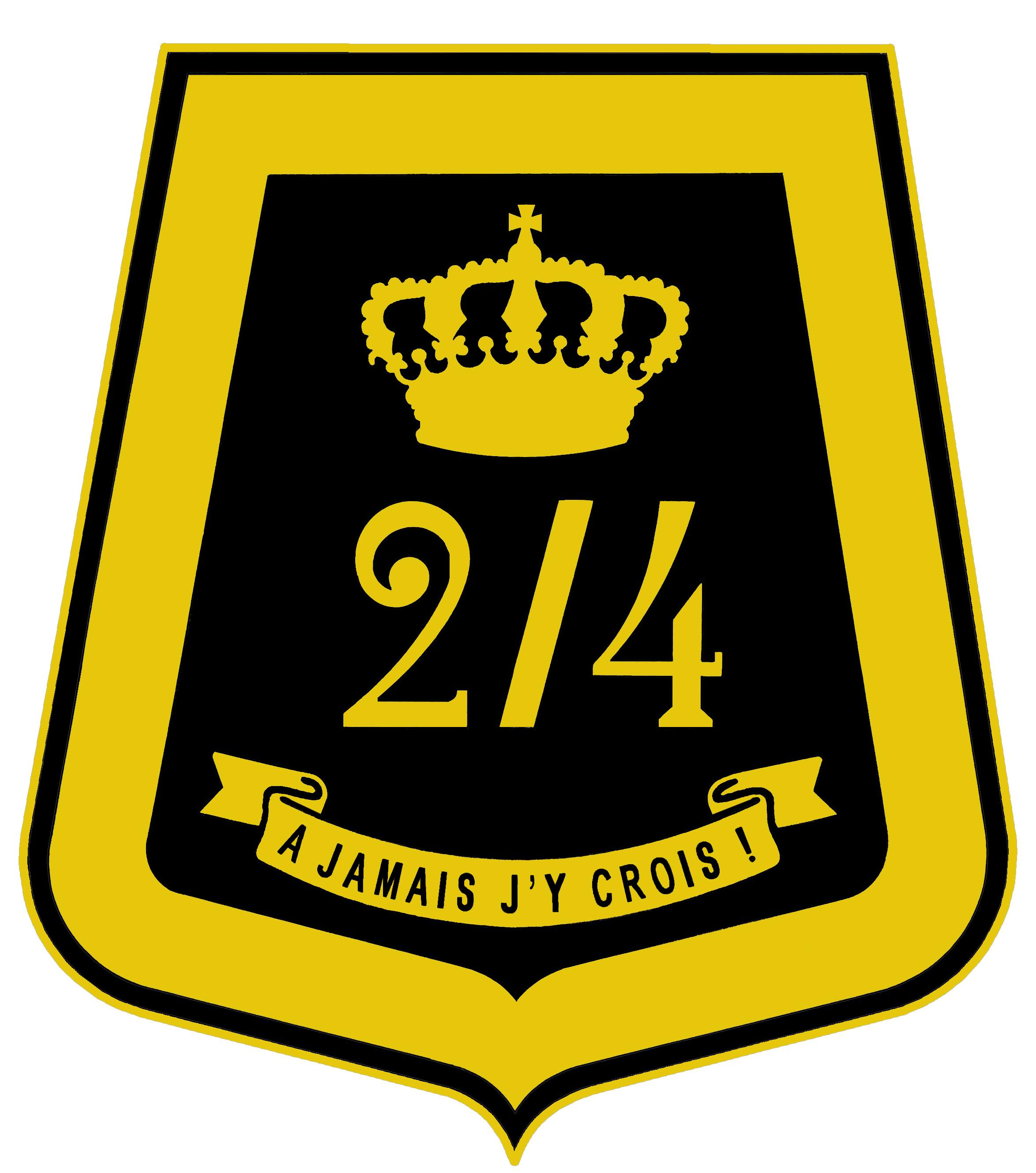 Drapeau du Régiment du 2/4 Chasseurs à Cheval.